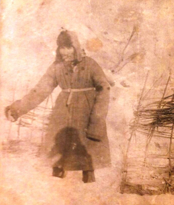 Қазақша (кирил): Шығанақ Берсиев ерте көктемде егістіктің қарын бақылау сәтінде